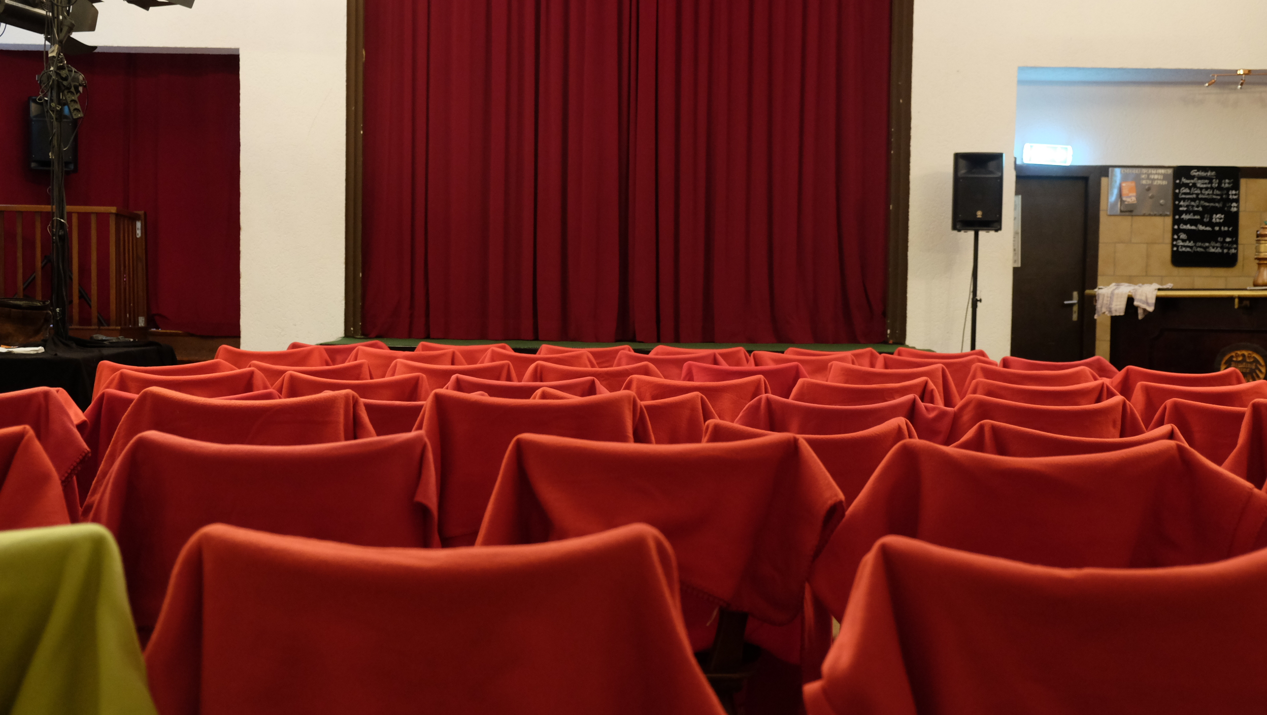 Eine Ansicht des Innenraums des Theater Lempenfieber in Frankfurt am Main kurz vor Einlass zu einer Vorstellung. Die Aufnahme ist aus der letzten Reihe des theaters. Der Bühnenvorhang ist geschlossen.